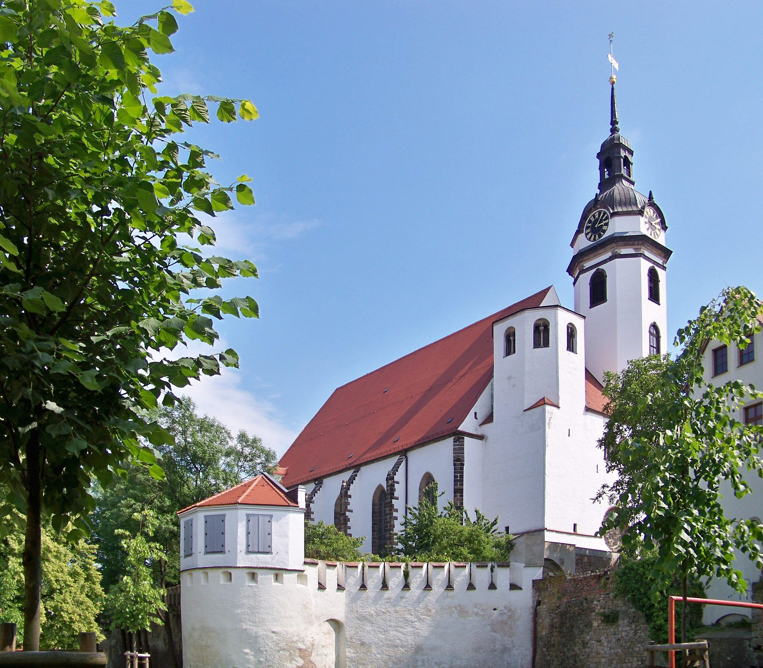 Stadtkirche St. Marien in Torgau und ehemaliger Apothekergarten der Mohren-Apotheke mit Gartenhaus